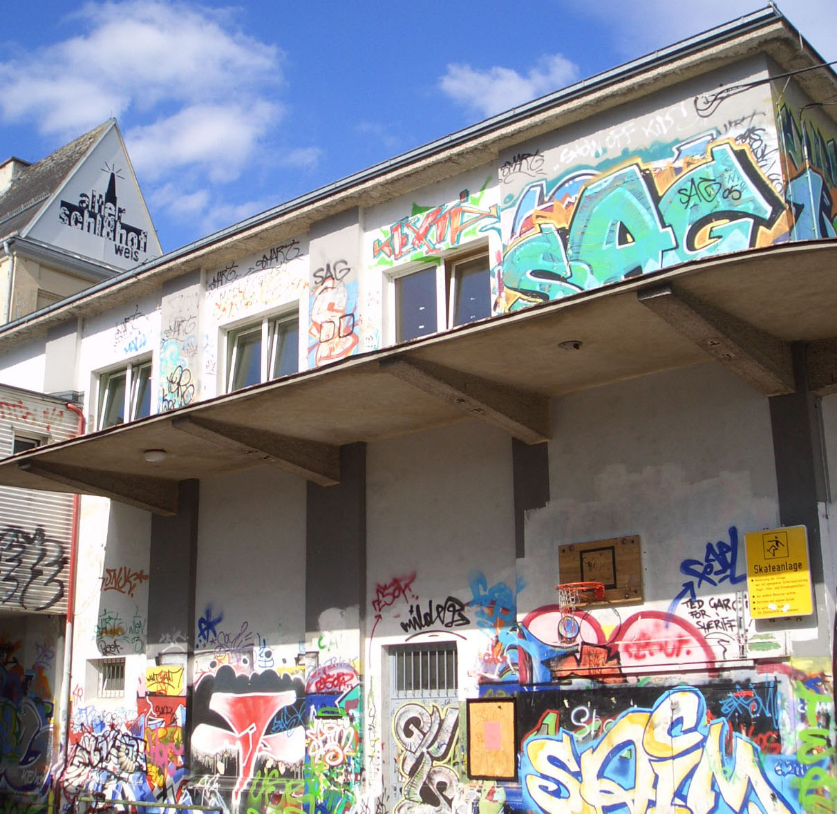 Kulturzentrum Alter Schlachthof in Wels